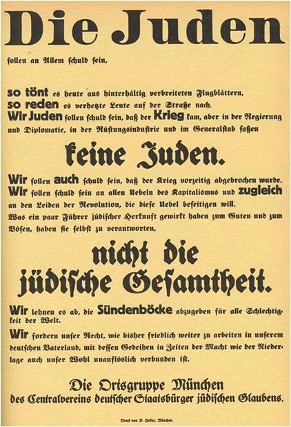 Flugblatt bzw. Zeitungsanzeige des Centralvereins deutscher Staatsbürger jüdischen Glaubens